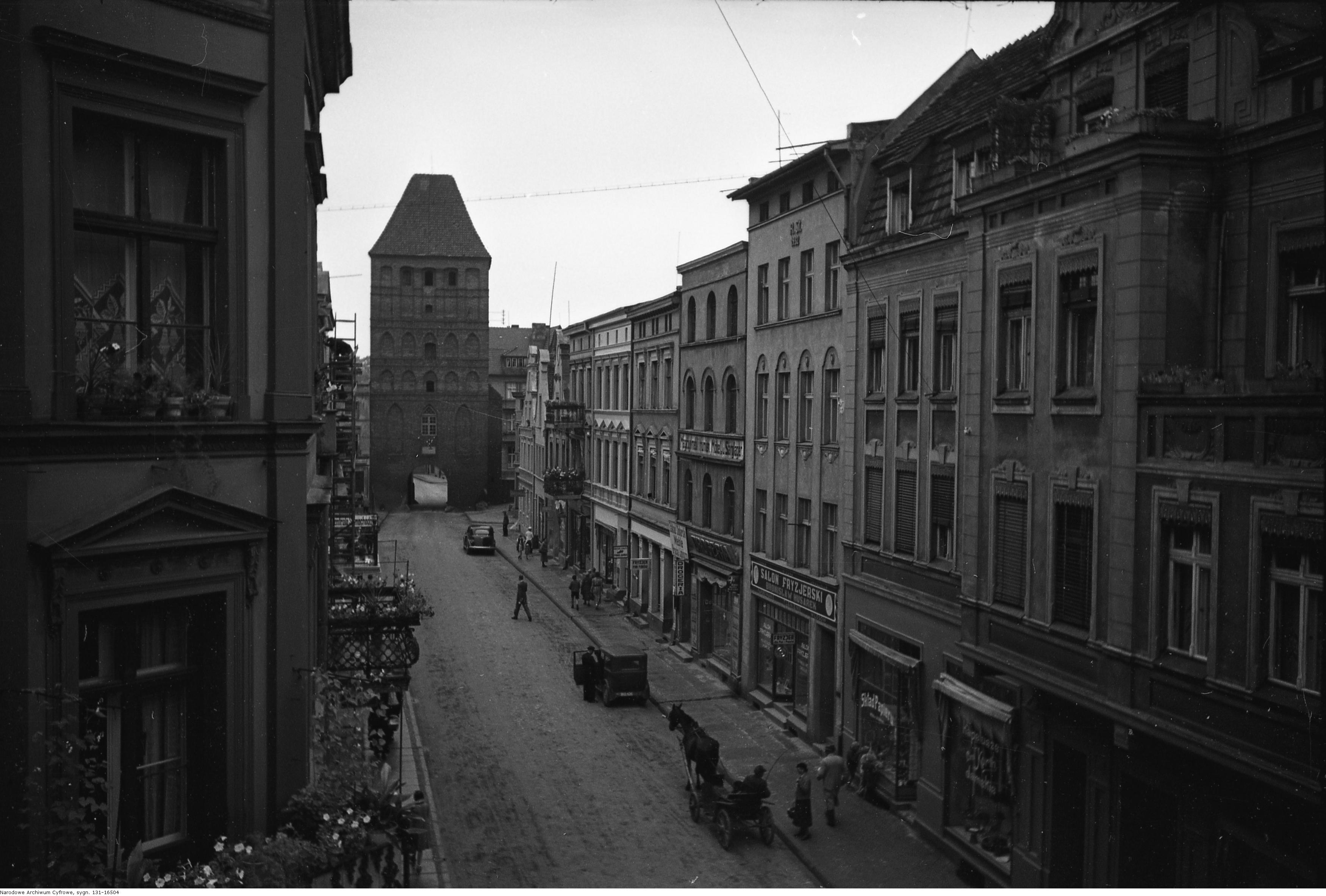 [Ulica w mieście - widok z góry.]